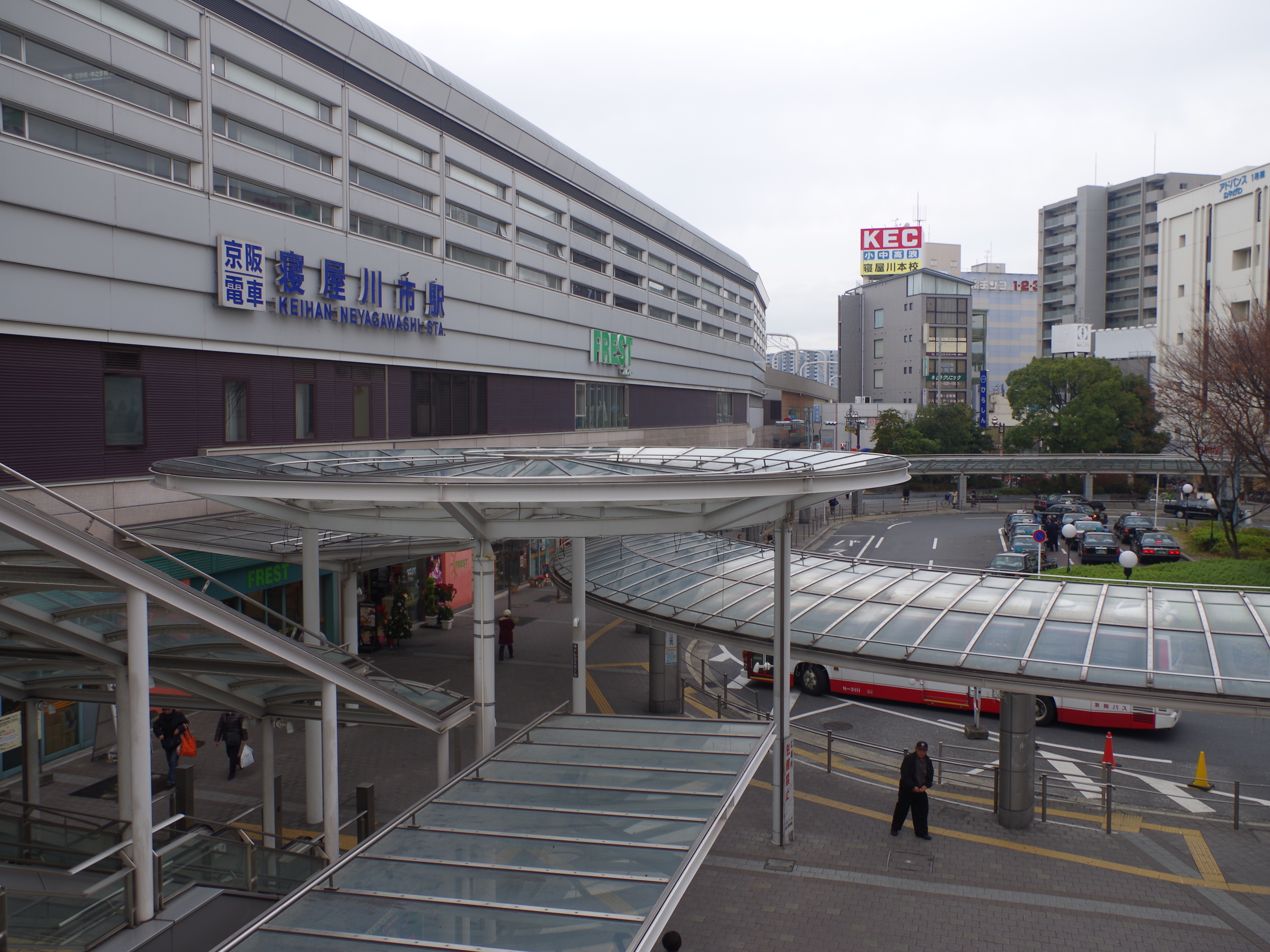 京阪本線 寝屋川市駅 Neyagawashi station 2012.12.17